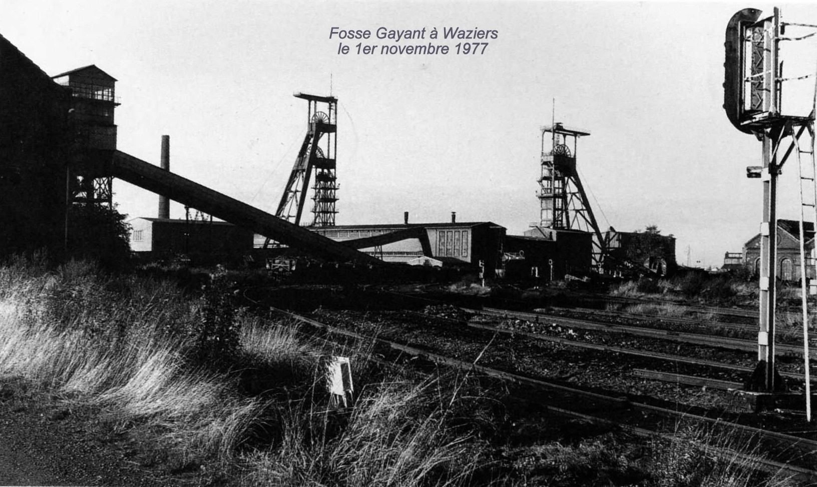 Fosse Gayant à Waziers aujourd'hui disparue